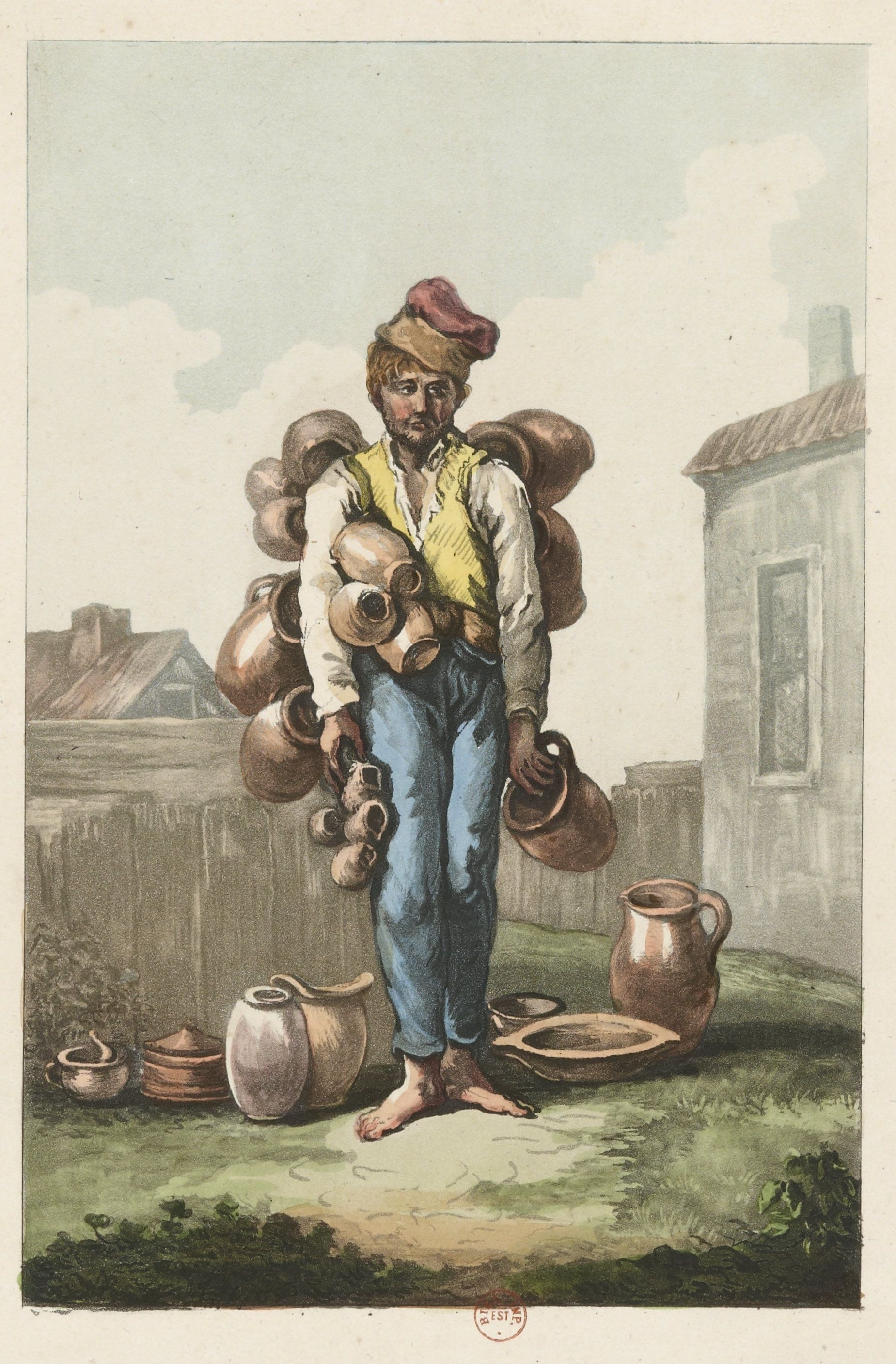 Торговец кувшинами